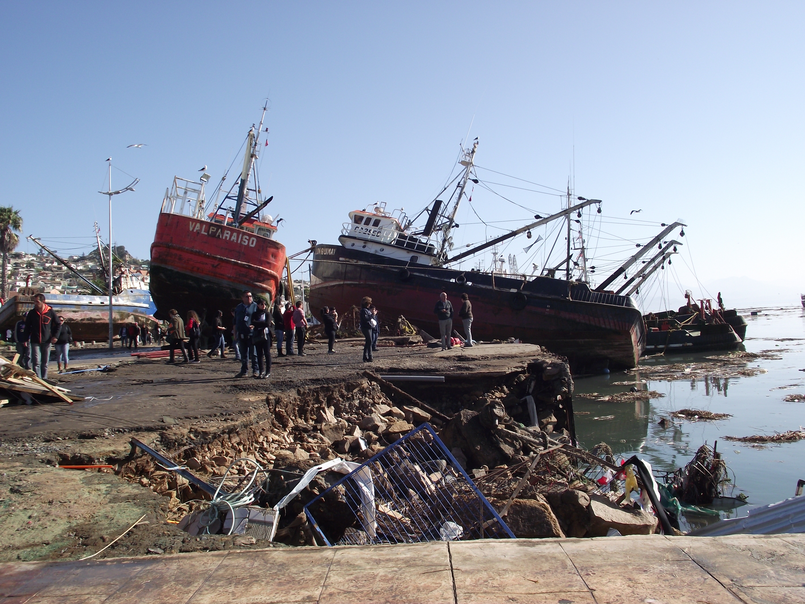 Embarcaciones varadas en la avenida Costanera de Coquimbo tras el terremoto de 2015.